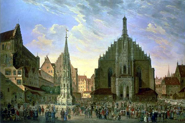 Der Hauptmarkt in Nürnberg, Ölgemälde nach einer Lithographie von Domenico Quaglio. Aus dem 1966 abgerissenen Haus zum Sonnenbühl, Rämistr. 48, Zürich. Öl auf Leinwand, 176.5 cm x 252 cm. Schweizerisches Landesmuseum, Zürich.